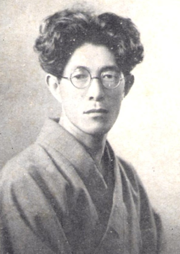 1953年刊行『音楽家の世界』(創元文庫)より。